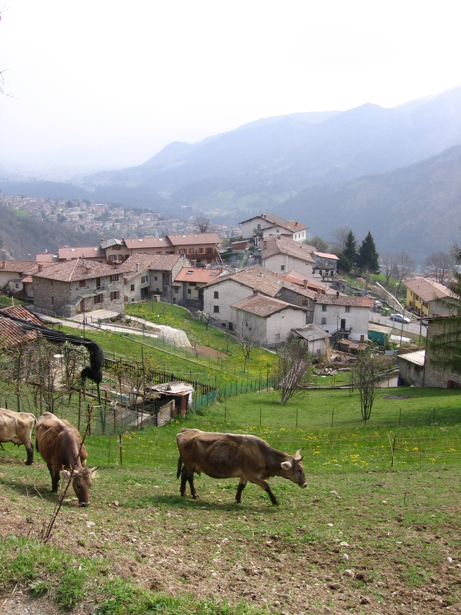 Premolo, Bergamo, Italia